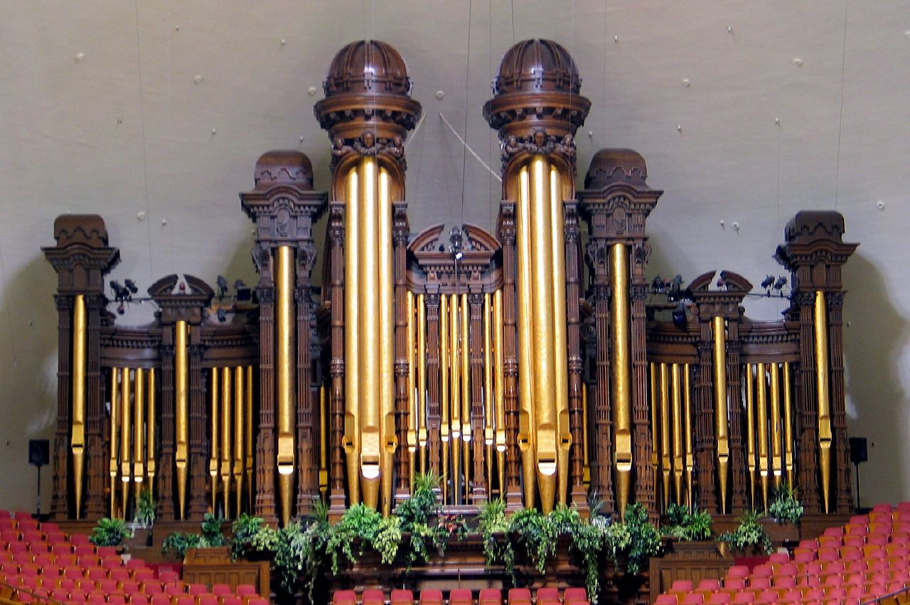 Organ